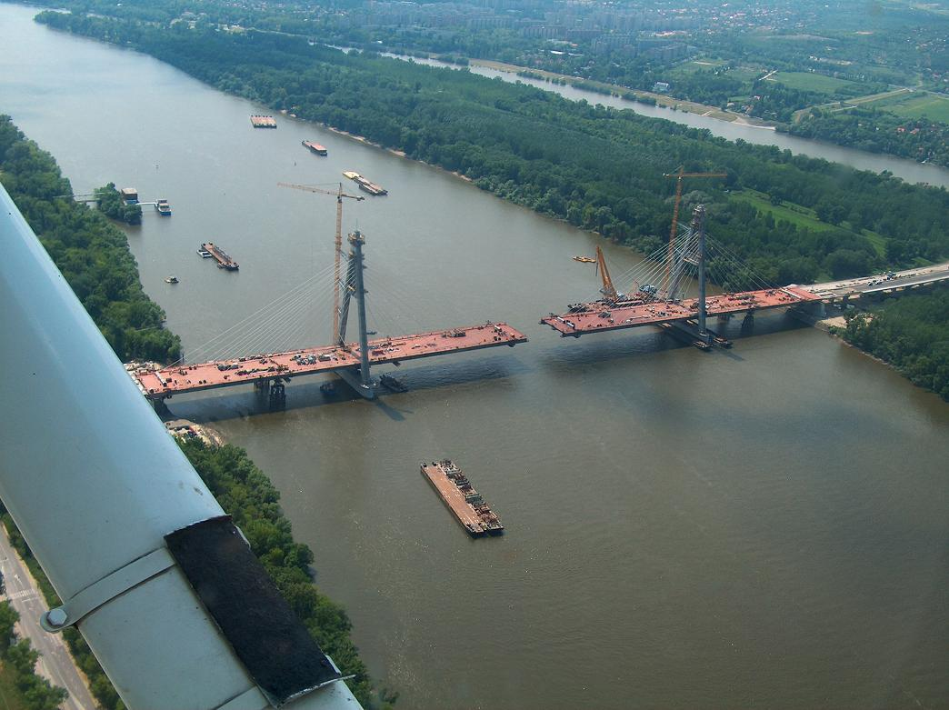 Megyeri híd építése